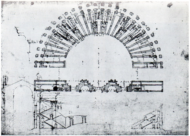 Rilievo di Andrea Palladio della pianta del teatro romano di Vicenza a Borgo Berga. Immagine tratta da: Andrea Palladio, "Pianta del teatro antico di Vicenza".